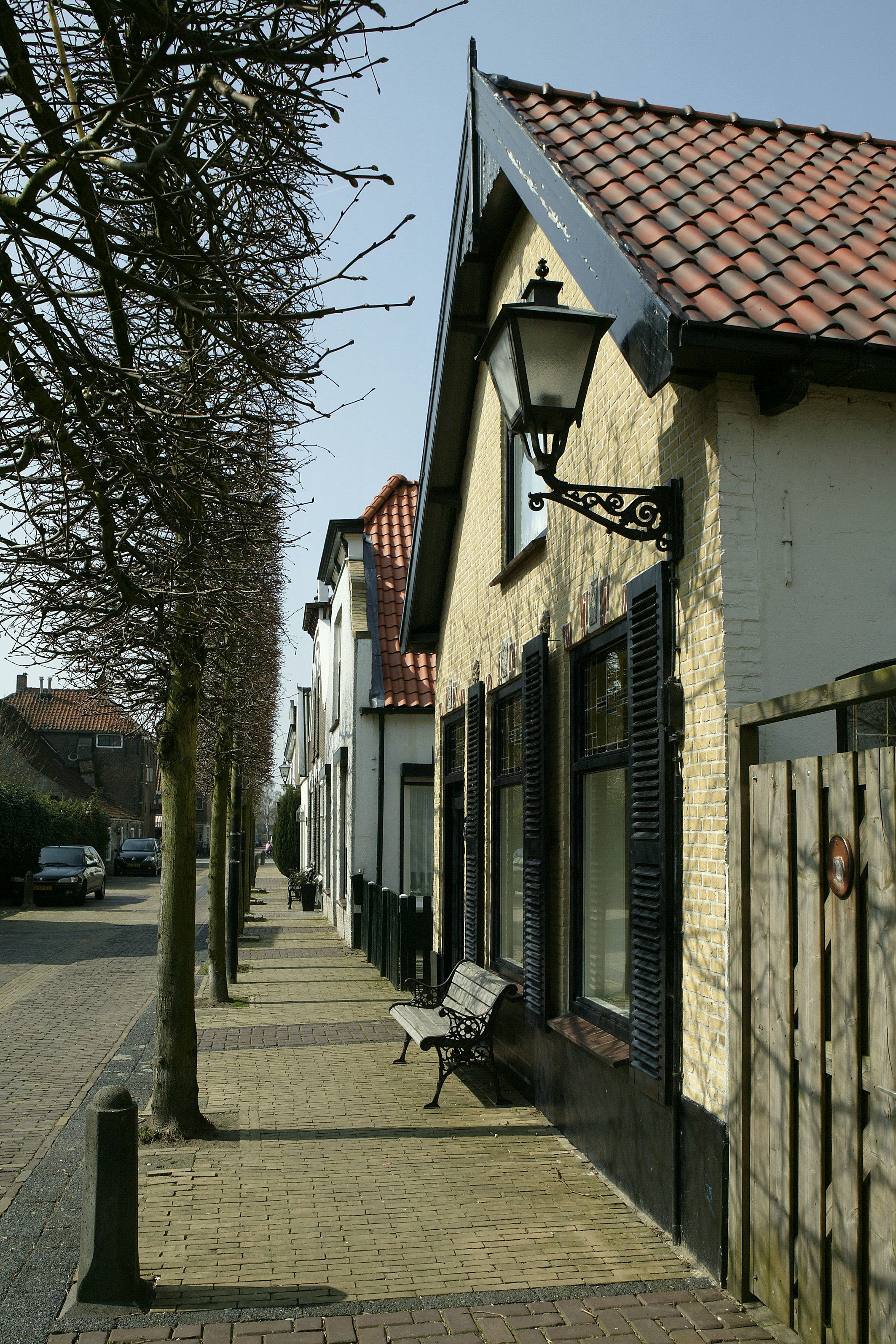 Straatbeeld: Straatbeeld (opmerking: Foto's verkregen uit privé-collectie van fotograaf P. van Galen.)